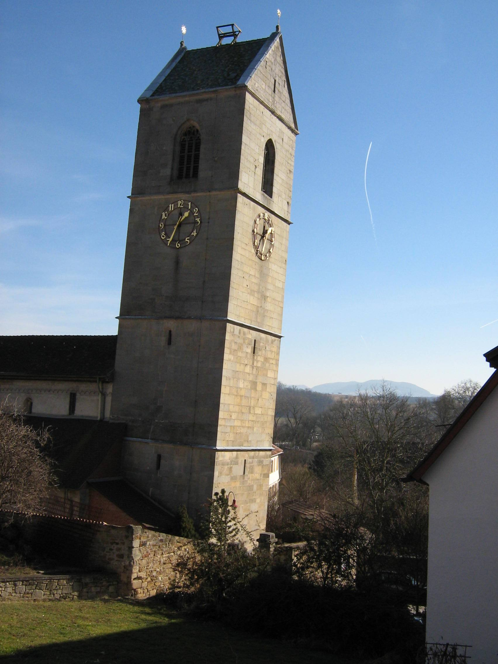 Der nach Südwest geneigte Kirchturm von 1501, Martinskirche (Neckartailfingen)